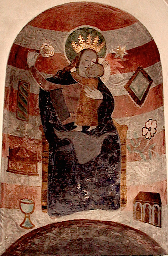 Чудотворный образ Богородицы "Мария - отпущение грехов" в русской церкви святых равноапостольных Константина и Елены в Кёльне.